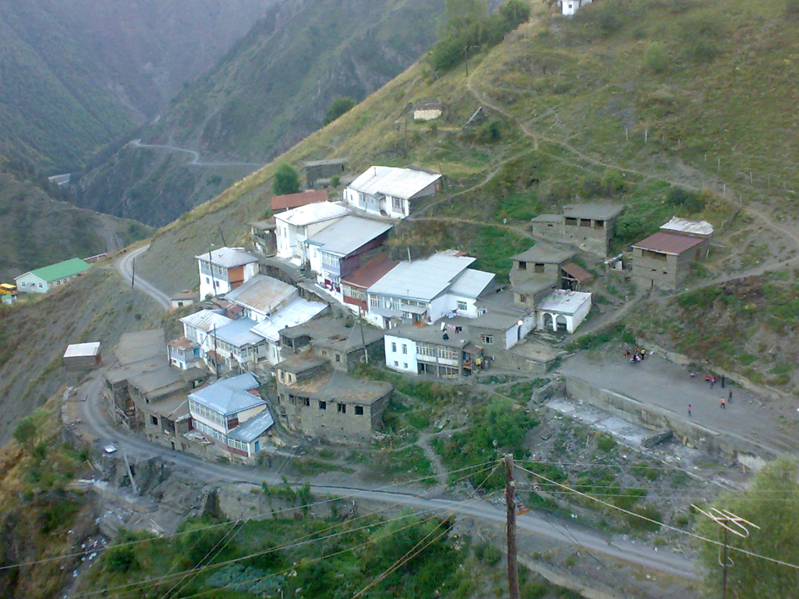 село Цахур нижний квартал